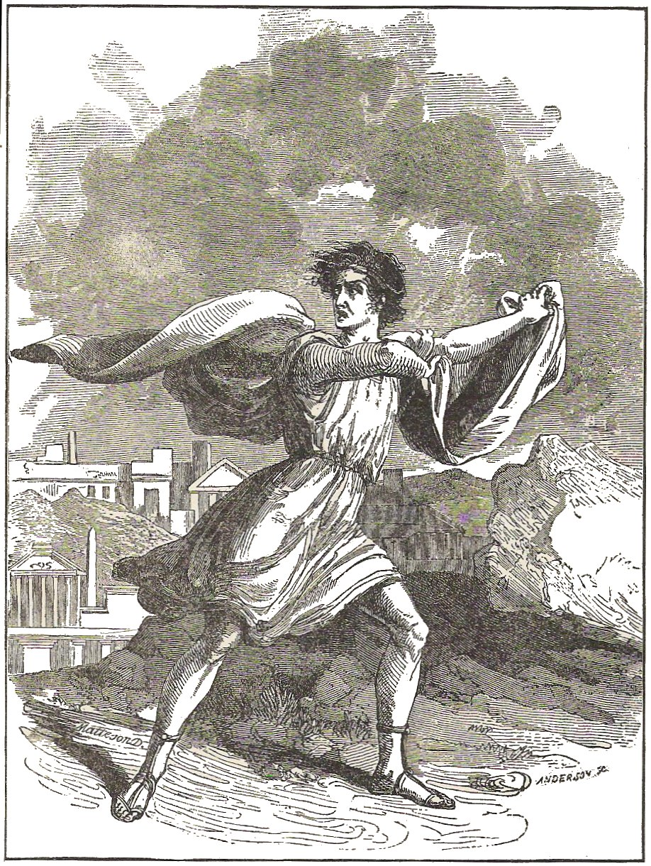 Illustration